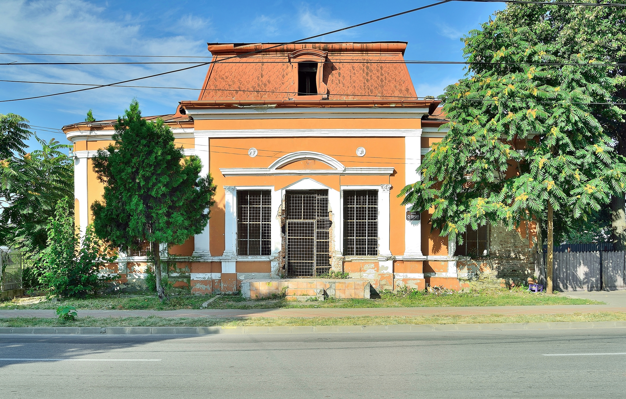 Această clădire a fost construită la sfârşitul secolului al XIX-lea şi are o importanţă deosebită istorică şi culturală, aici funcţionând, în perioada 1927- 1948, Societatea Culturală «Miron Costin», ulterior Biblioteca Municipală şi Librăria «Miron Costin»” Biblioteca publica a funcţionat şi în localul Şcolii nr. 3 de băieţi până în anul 1909 când s-a mutat într-un nou local, pe strada Ştefan cel Mare, nr. 213 unde a fiinţat pînă în anul 1974. Imobilului situat pe strada Ștefan cel Mare, nr. 213, este imobil clasificat ca monument istoric de interes local.